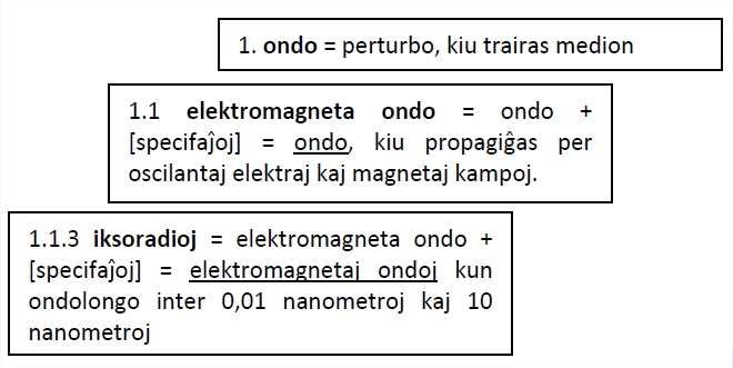 Difinoj por nocio-sistemo ĉe dosiero "terminologiaondo.jpg".